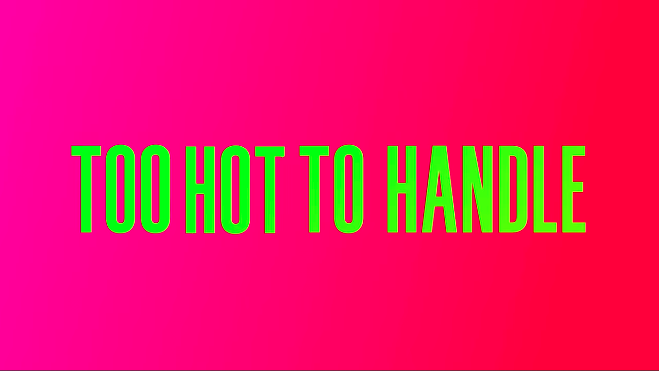 Too Hot to Handle